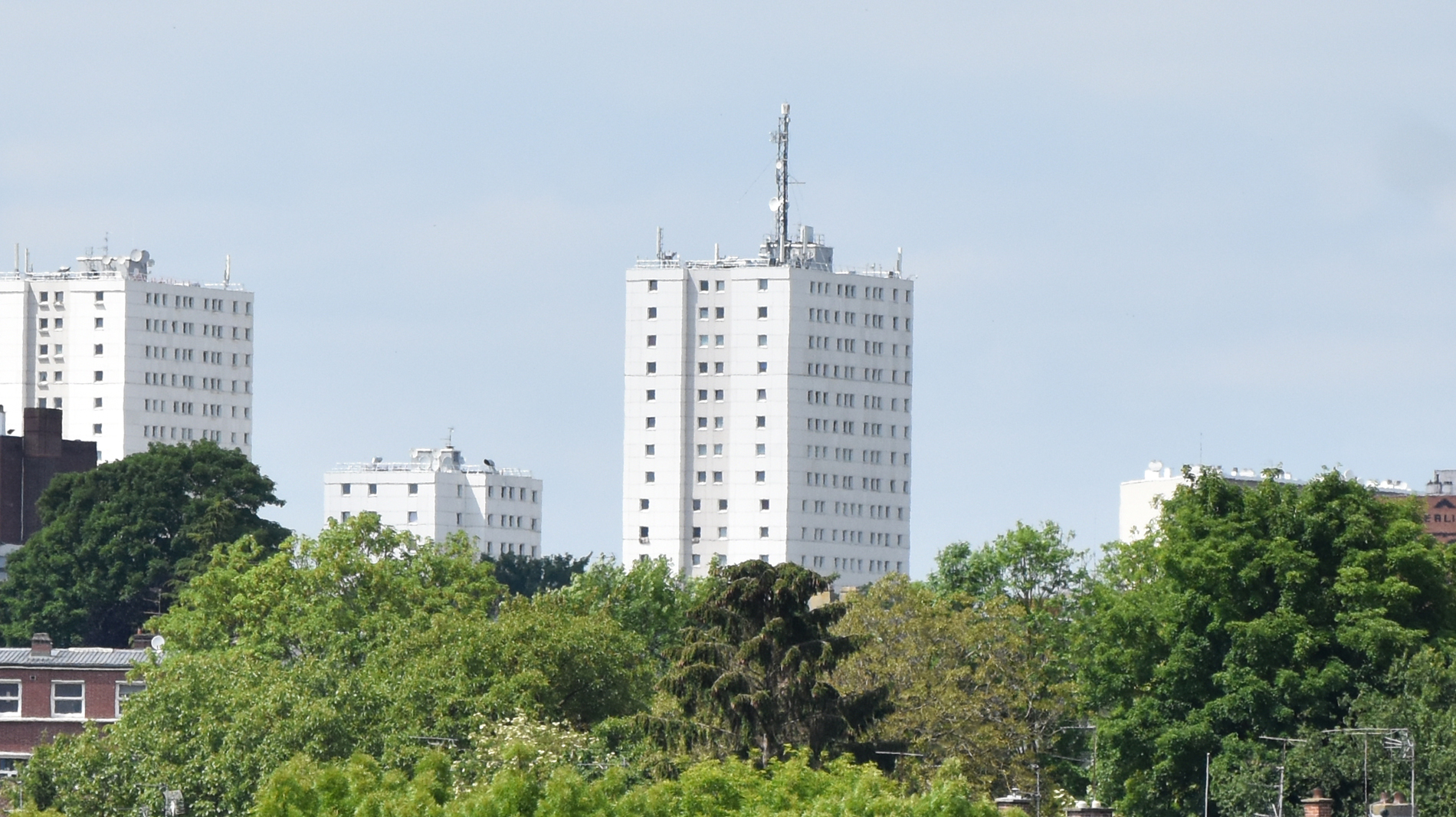 L'immeuble Maryse Bastié avec les antennes des télécoms (télévisions TNT, Téléphonie)